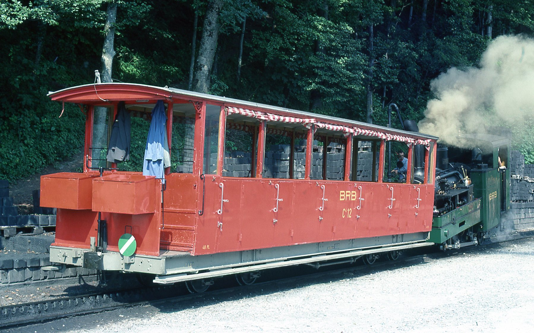 Photos. Trams aux Fils.